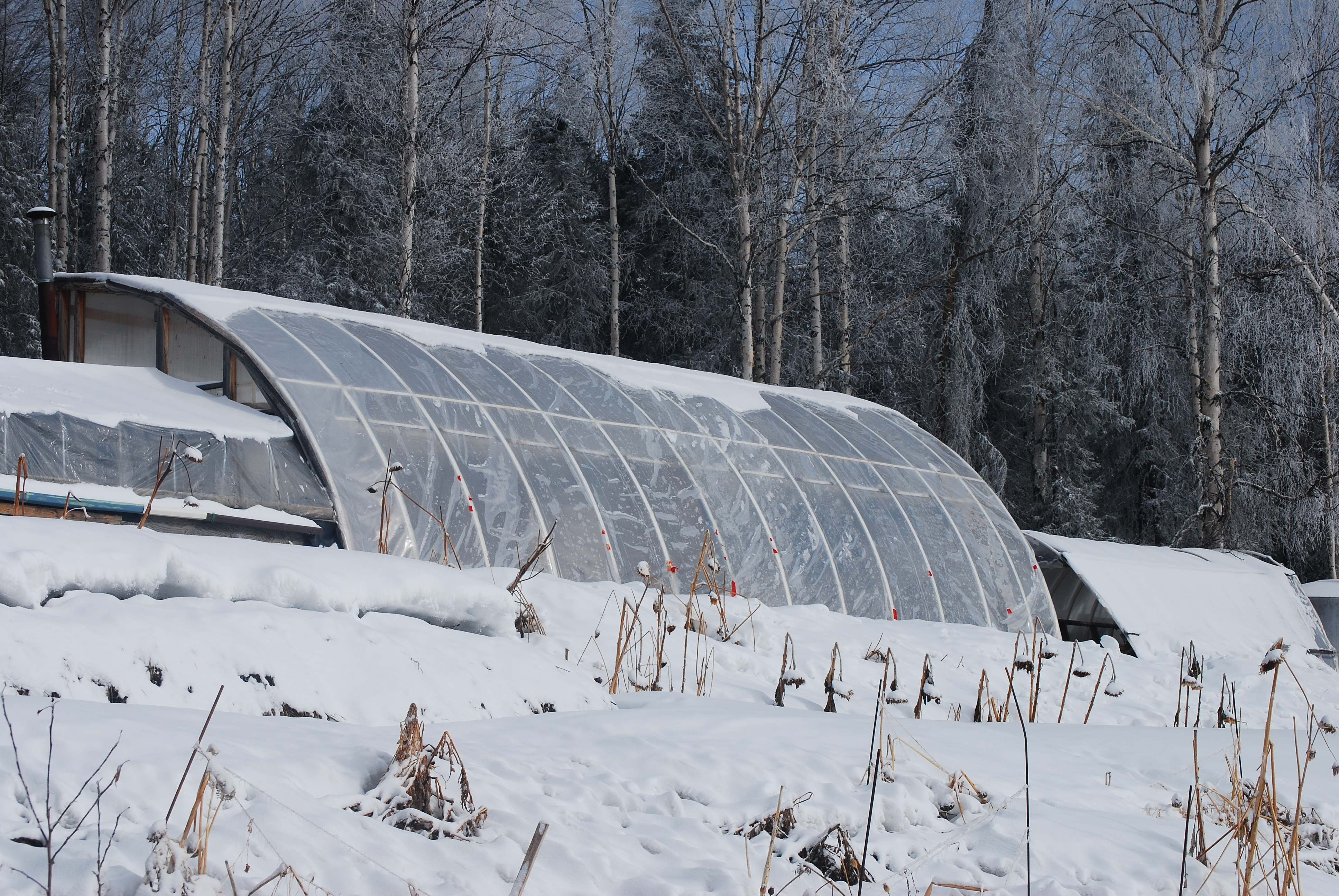 Sustainable Ag, Ester, AK